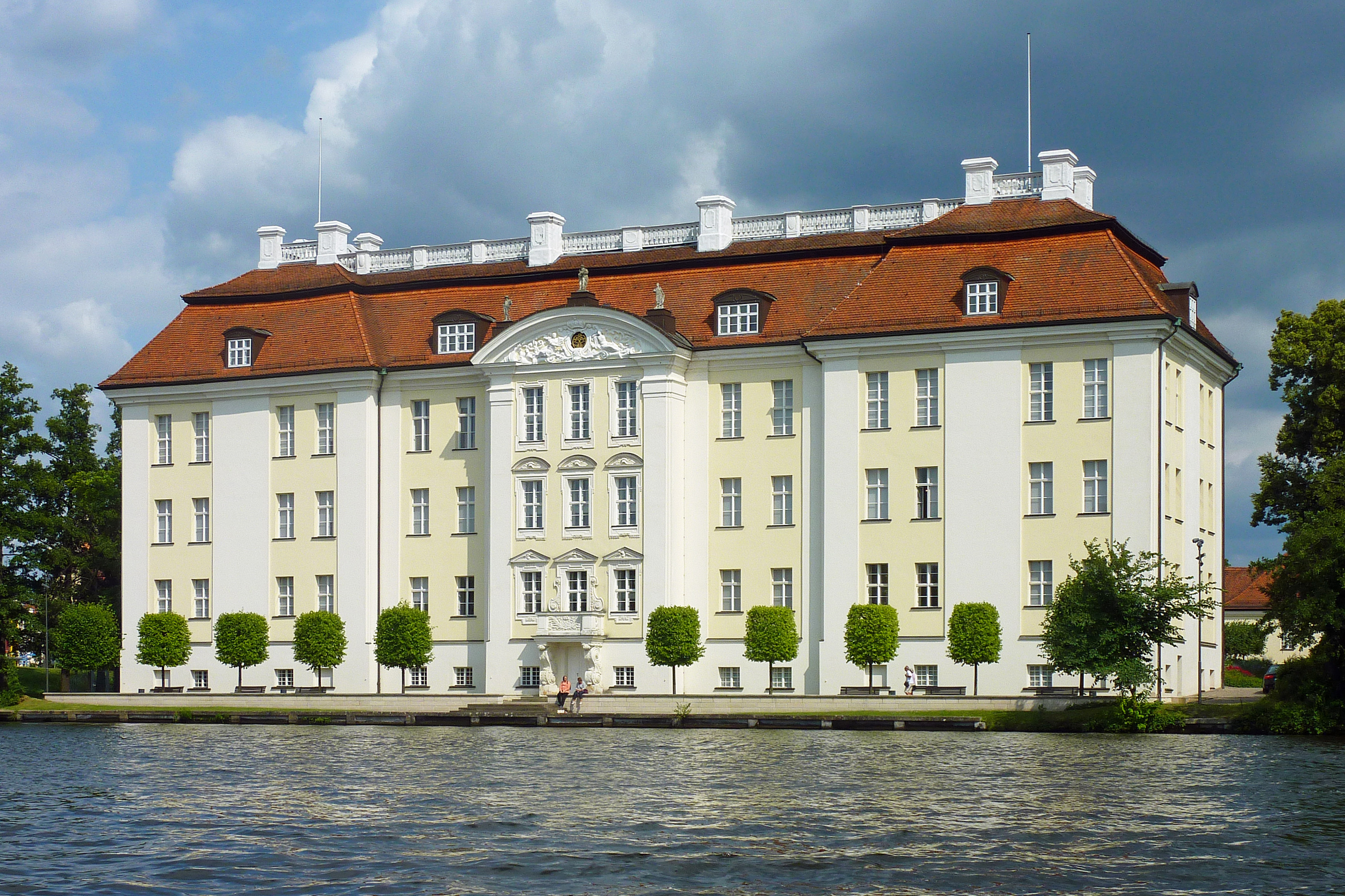 Das Schloss in Berlin-Köpenick von der Dahme aus gesehen.